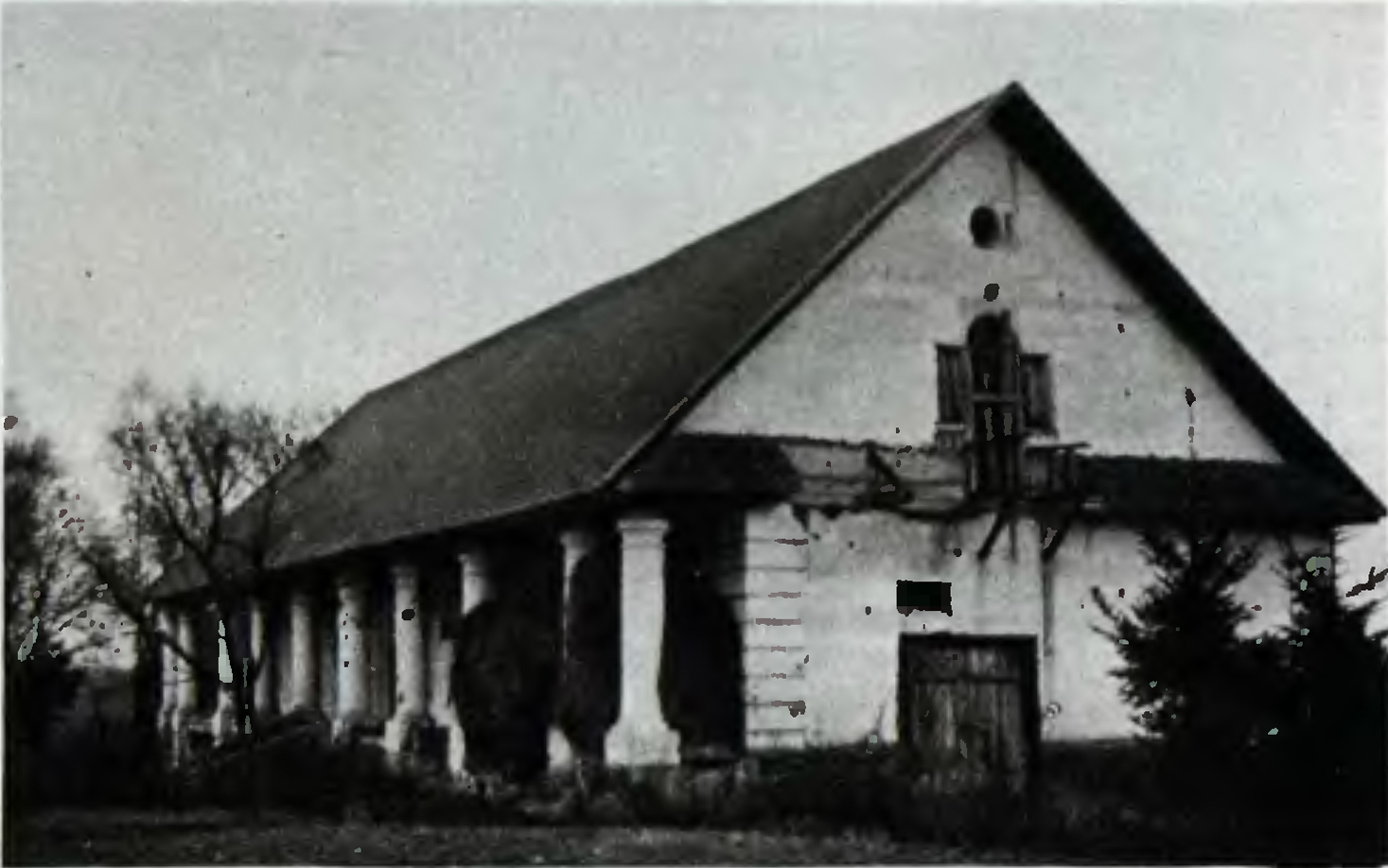 Беларуская (тарашкевіца): Манькавічы (Mańkavičy), сядзіба Друцкіх-Любецкіх (Drucki-Lubiecki)